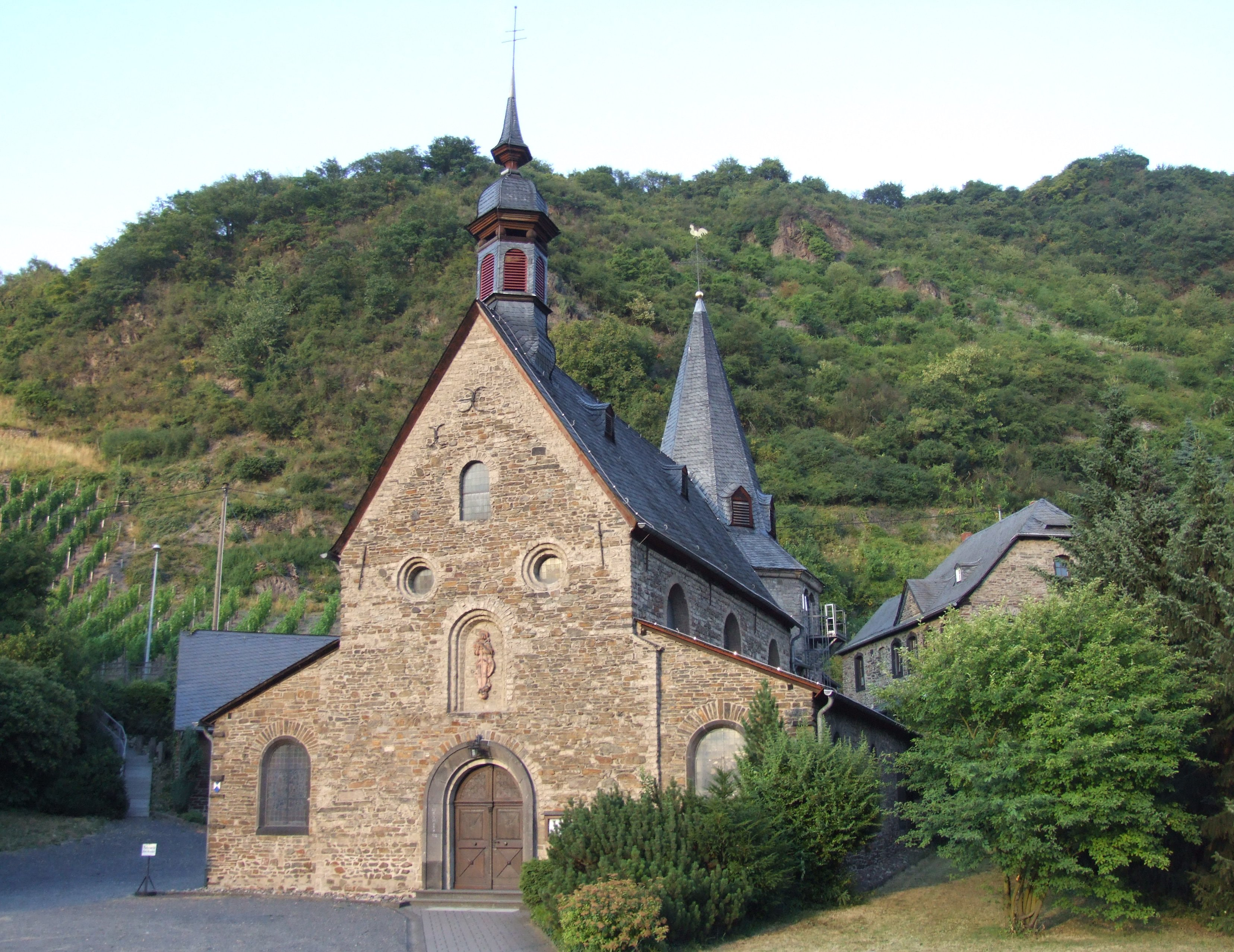 Sankt Georg in Oberhammerstein